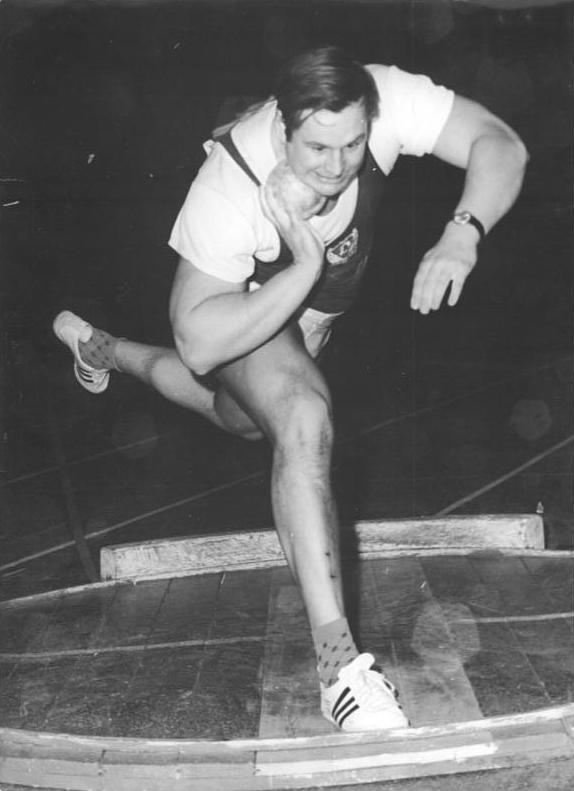 Hartmut Briesenick Zentralbild Mittelstädt 31.01.1971 Berlin:Leichtathletik-Hallensportfest in der Dynamo-Sporthalle-Mit der guten Weite von 19,80 m gewann Hartmut Briesenick (SC Dynamo Berlin) den Wettbewerb im Kugelstoßen.